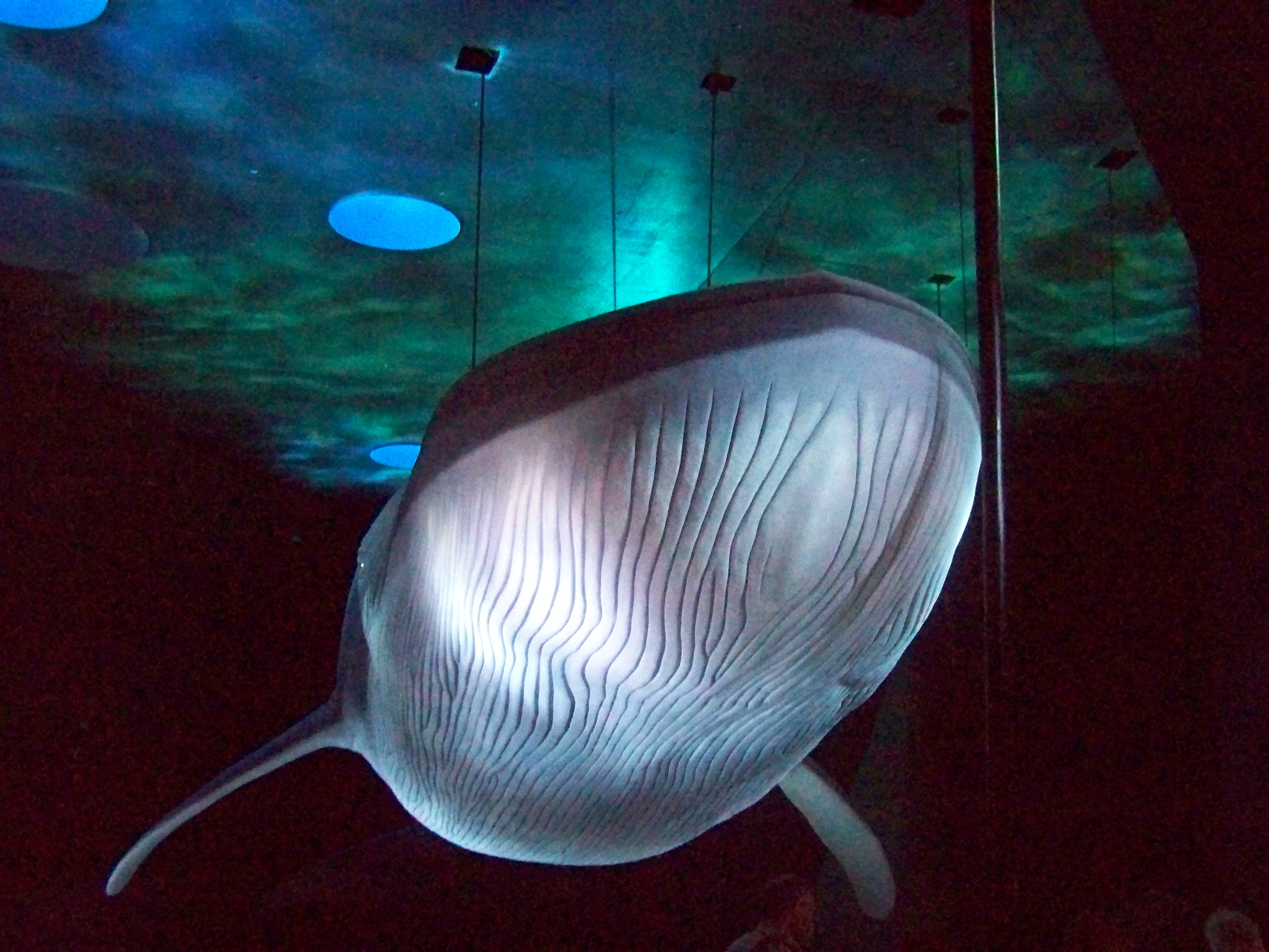 Im Ozeaneum Stralsund, Modell eines Blauwals.